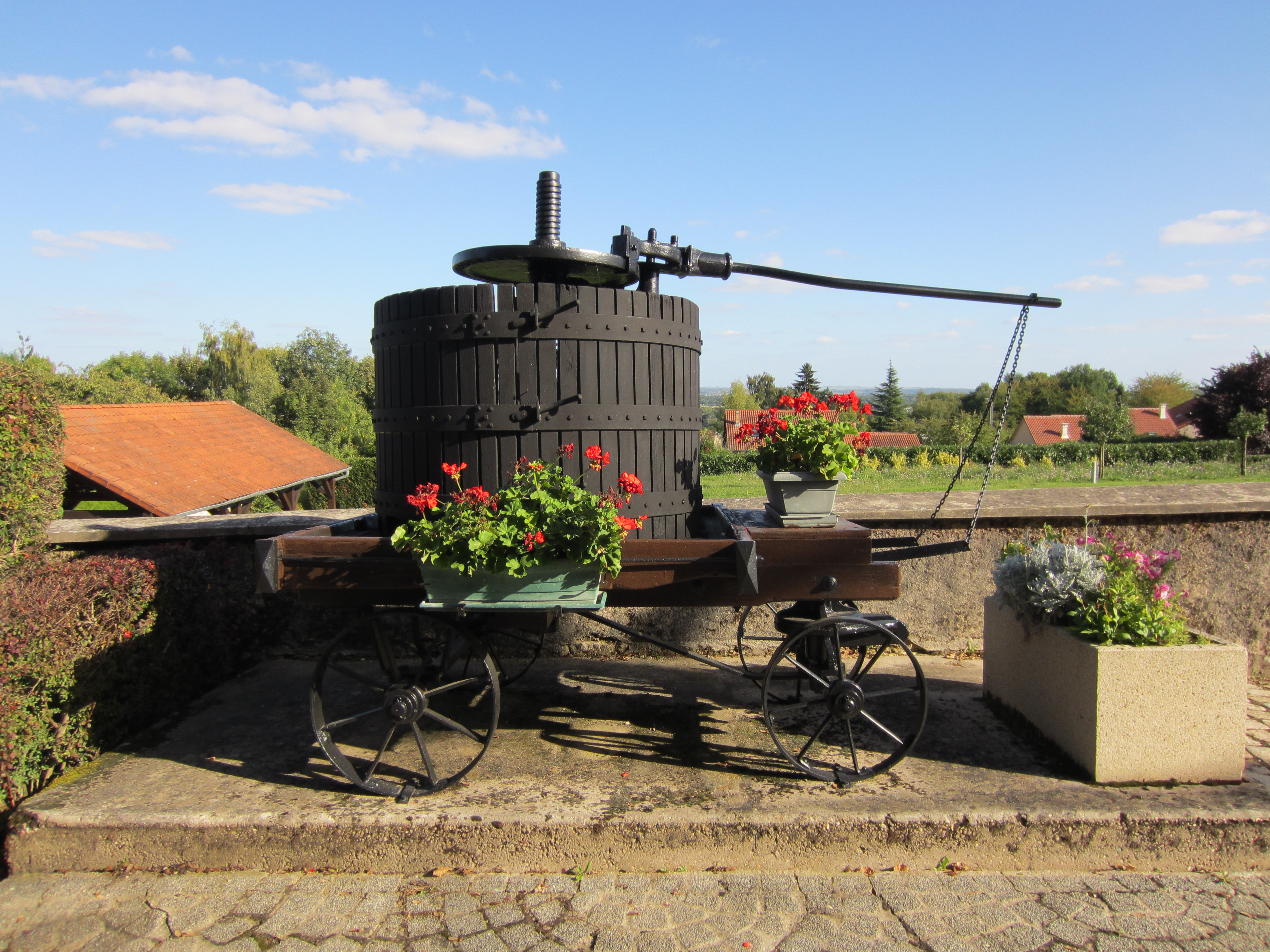 Description pressoir de Jussy Moselle pressoir de Jussy Moselle